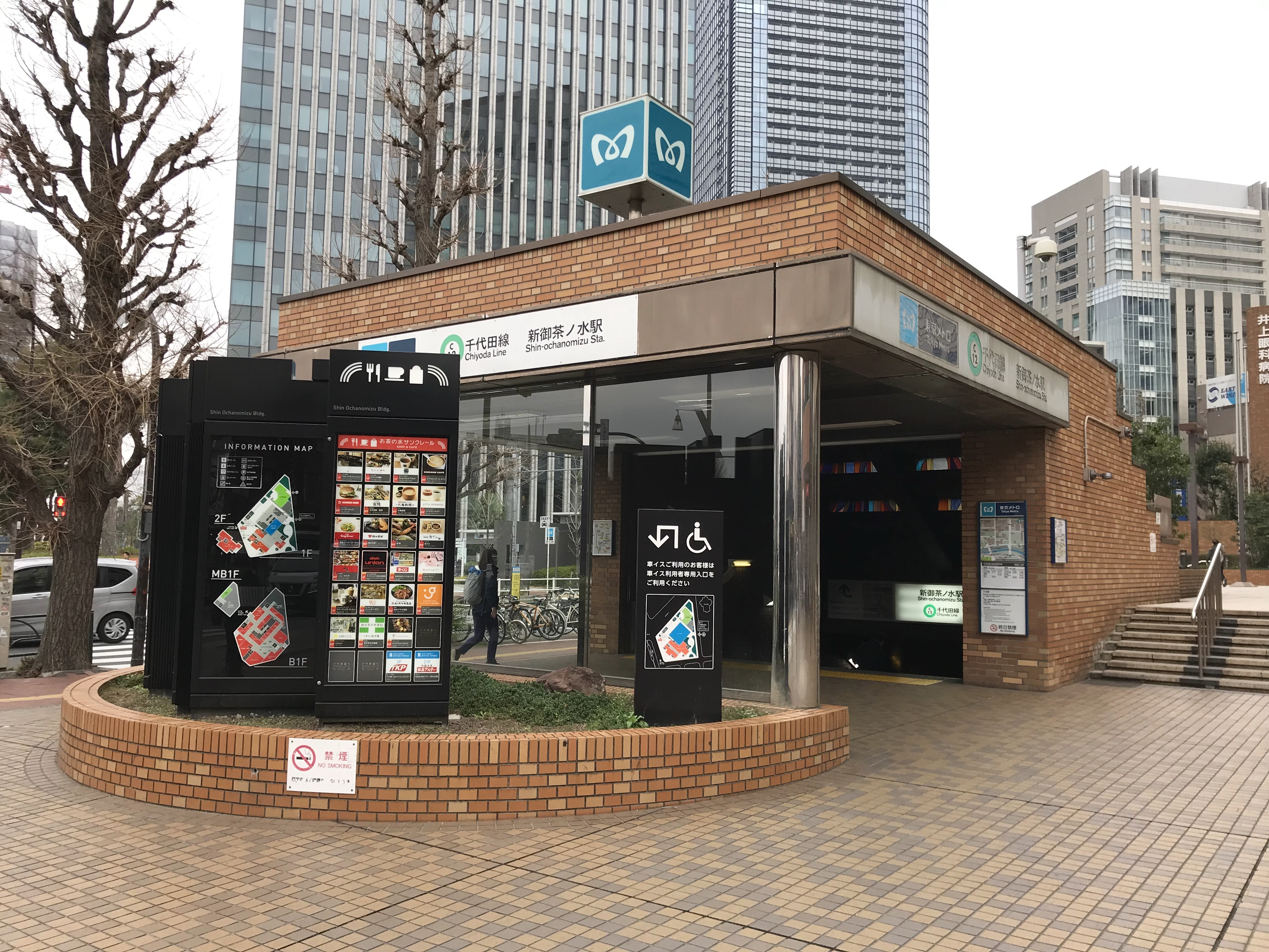 東京メトロ千代田線新御茶ノ水駅B1番出入口